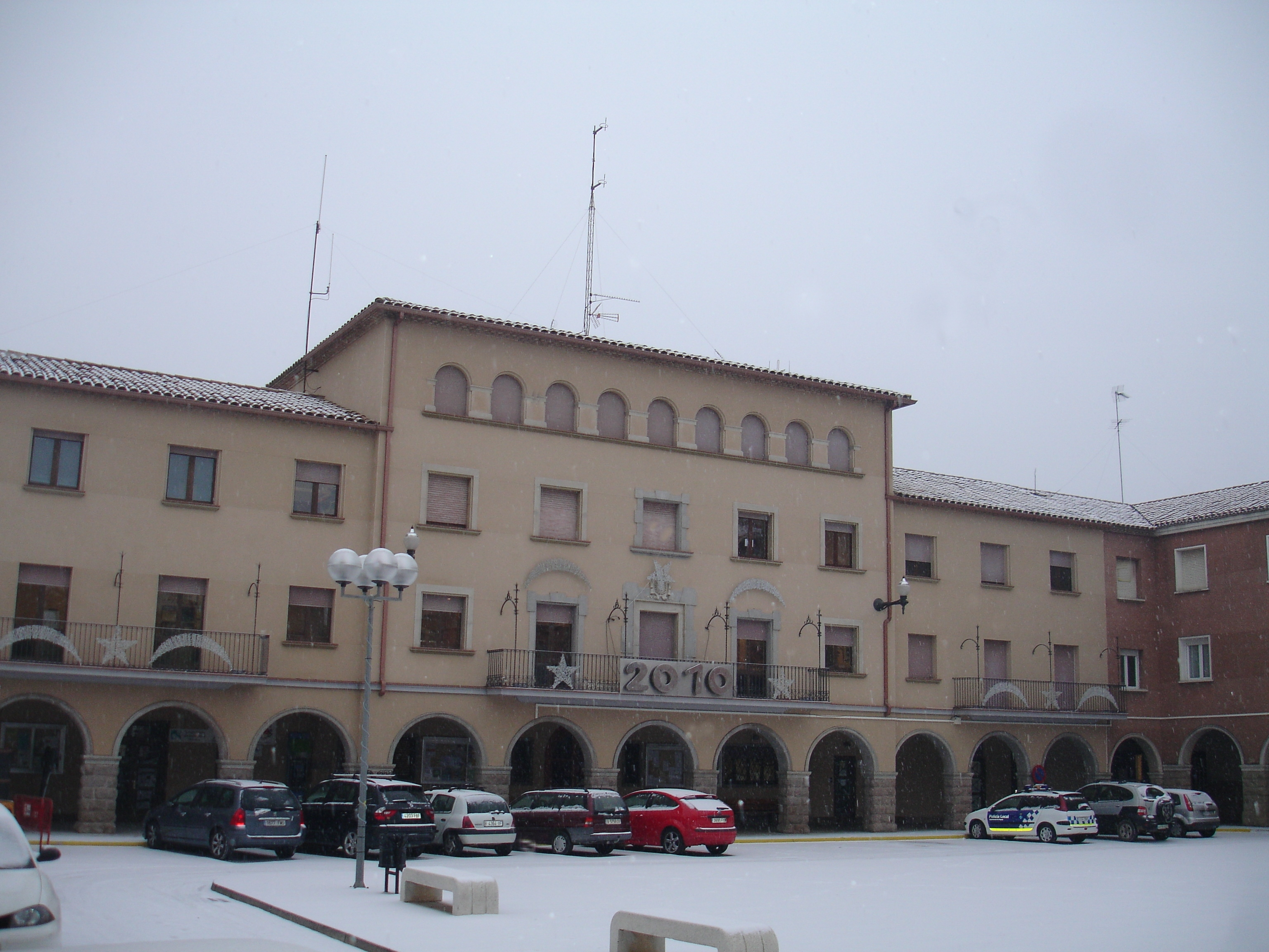 Plaça de l'Ajuntament de Navàs a la nevada del Desembre del 2009